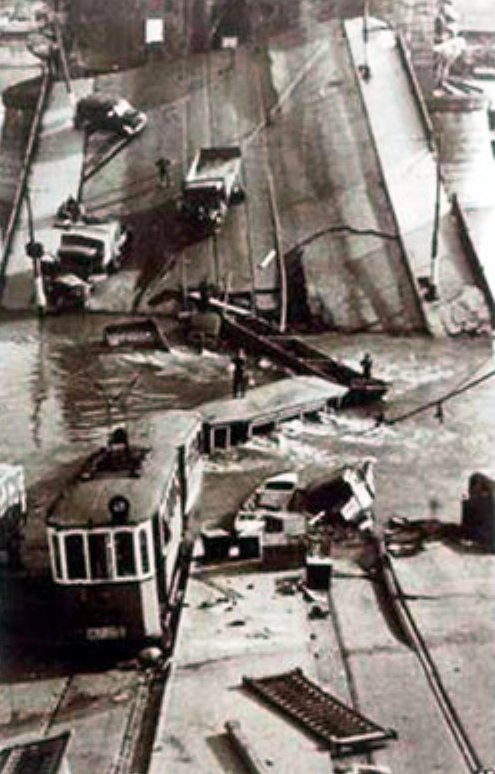 A Margit híd "véletlenül" felrobbantott pesti szárnya 1944. november 4.